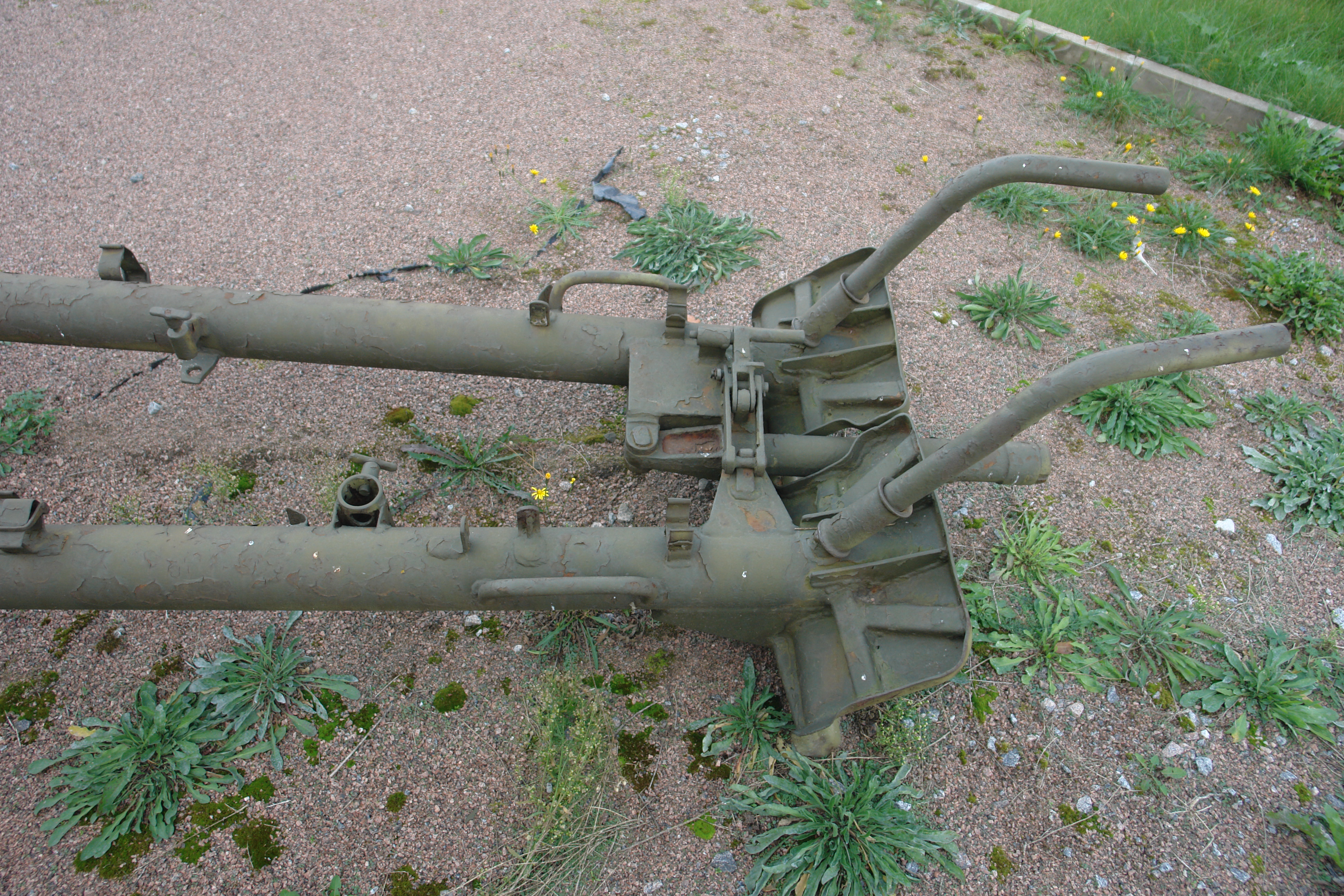 85-мм ДИВИЗИОННАЯ ПУШКА Д-44 ПРИНЯТА НА ВООРУЖЕНИЕ В 1946 г. ГЛАВНЫЙ КОНСТРУ^ОР Ф.Ф.ПЕТРОВ. ДАЛЬНОСТЬ СТРЕЛЬБЫ-15650 м. СКОРОСТРЕЛЬНОСТЬ - 15-20 ВЫСТР/МИН. МАССА, КГ: ОРУДИЯ-1725 СНАРЯДА-9,5. Военно-исторический музей артиллерии, инженерных войск и войск связи, Санкт-Петербург.